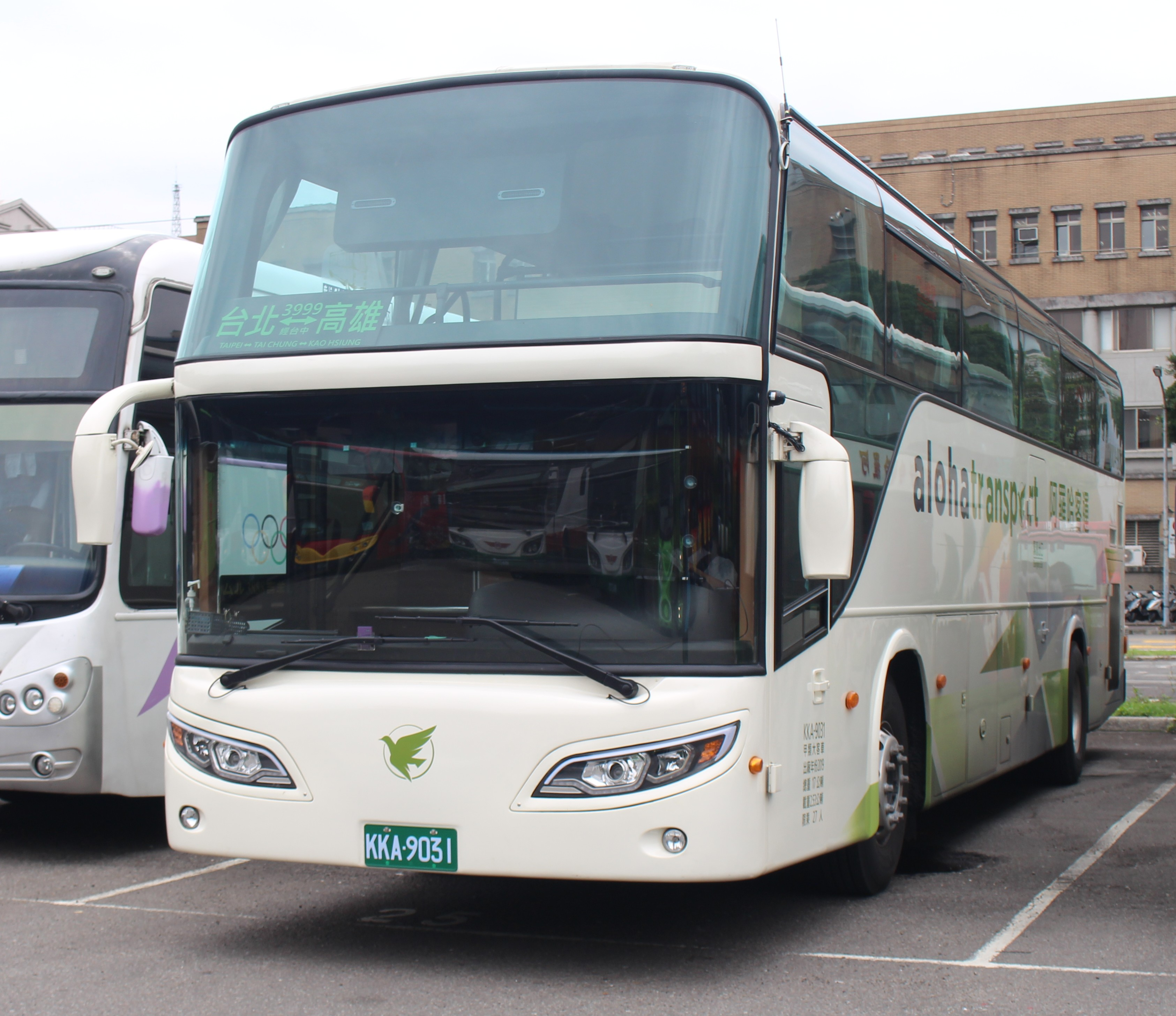 中文（台灣）: 阿羅哈客運2019年SCANIA K400IB4X2NB大客車KKA-9031。